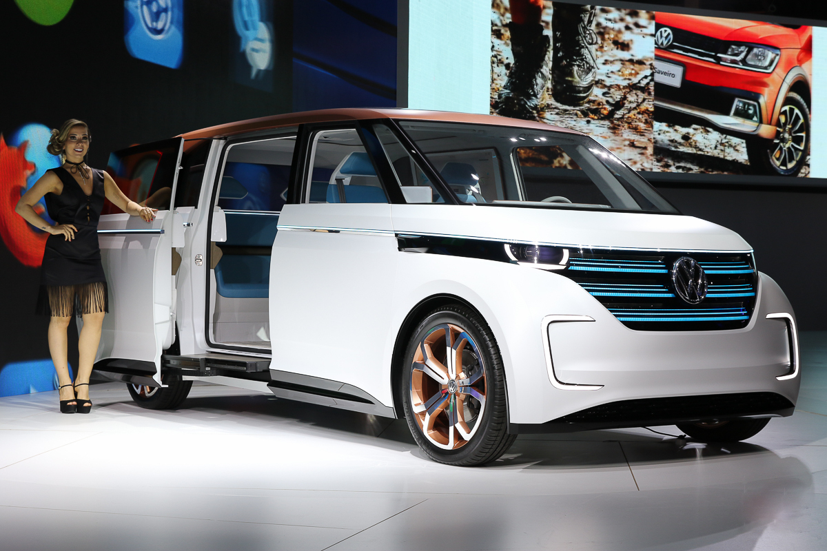 Salão do Automóvel 2016